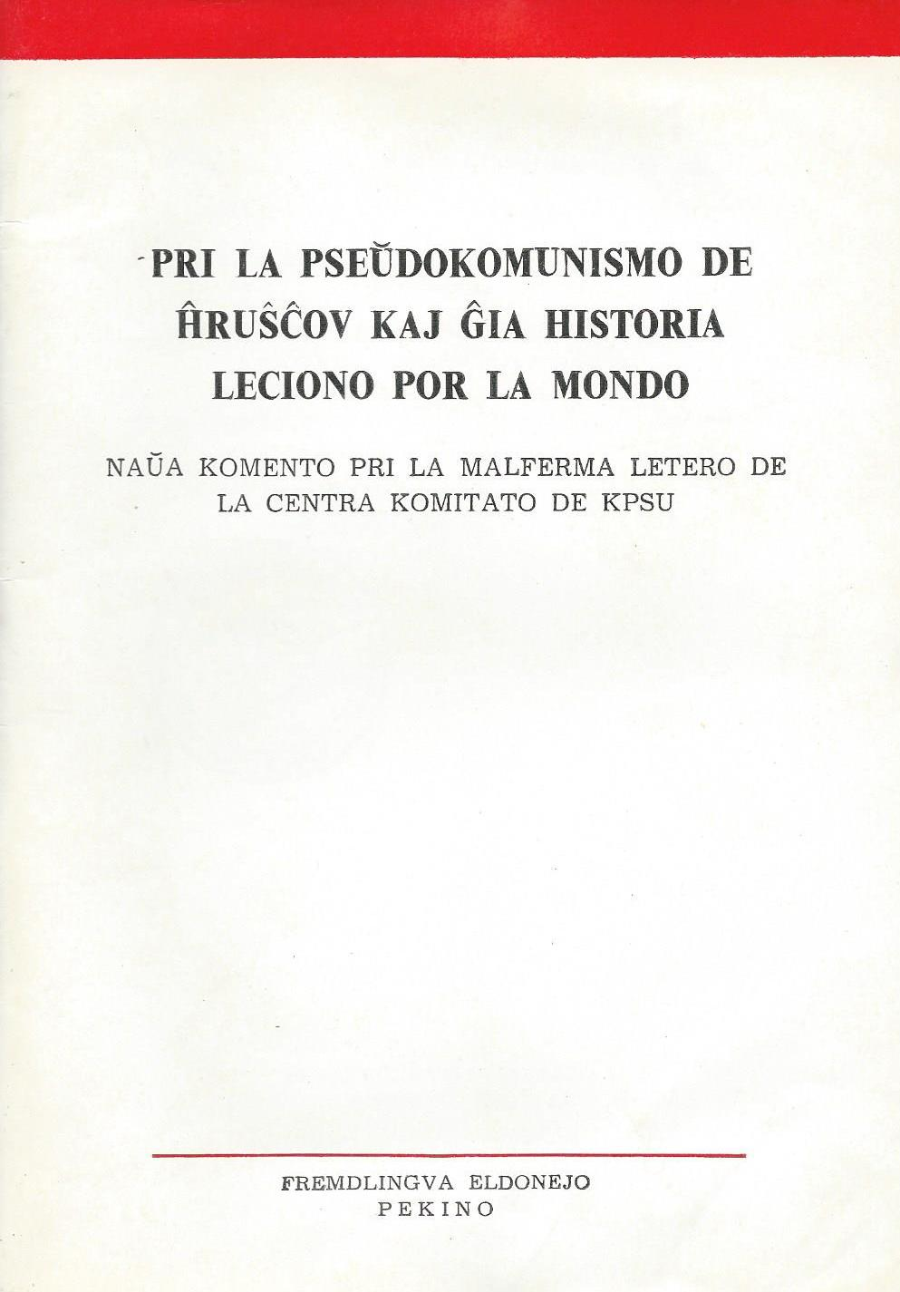 librokovrilo de "Pri_la_Pseŭdokomunismo_de_Ĥruŝĉov", 1965